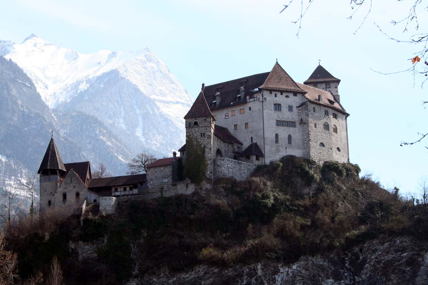 Burg Gutenberg in Balzers